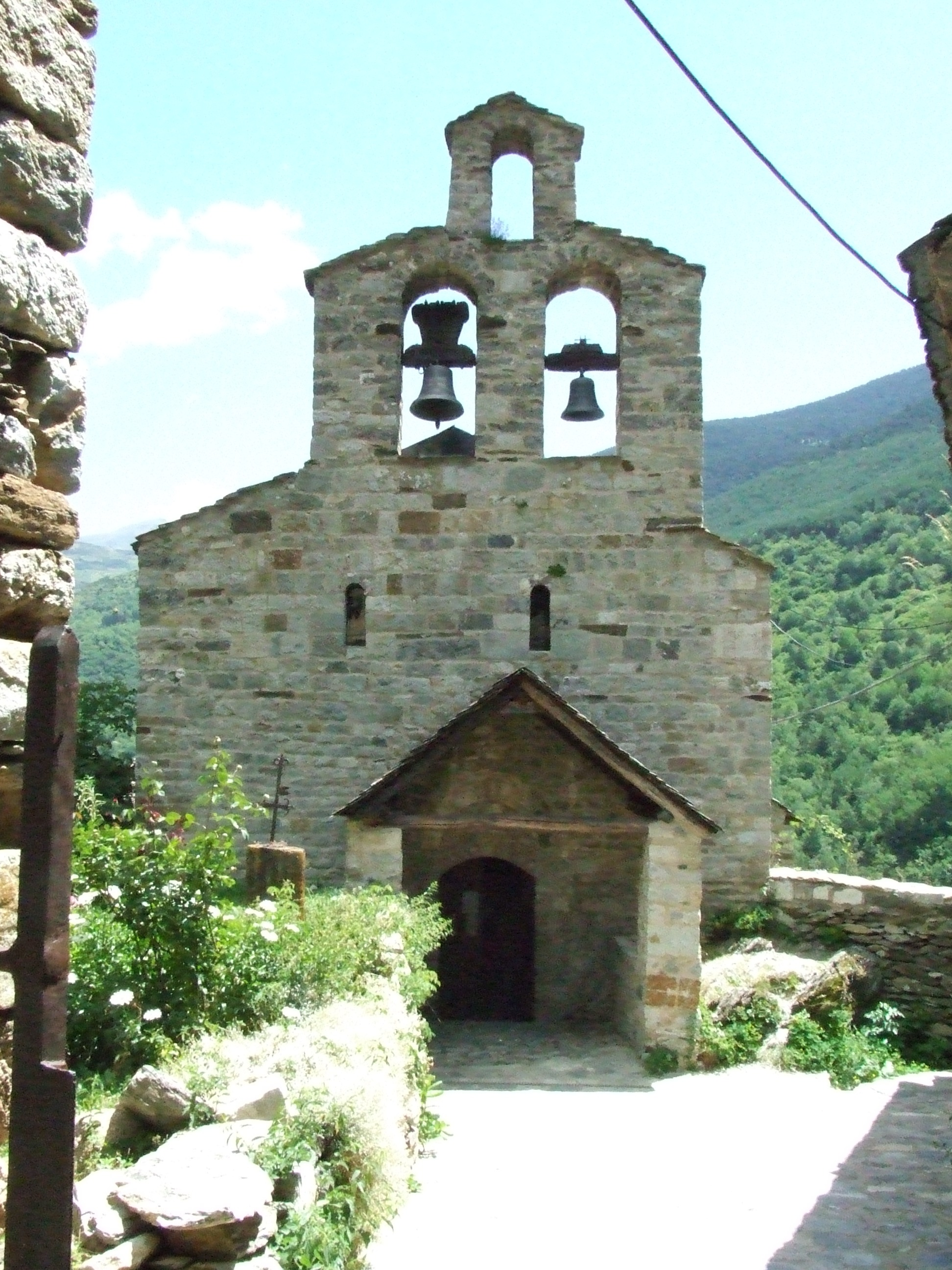 Façana de ponent de Santa Maria de Cardet (Barruera, Vall de Boí, Alta Ribagorça)